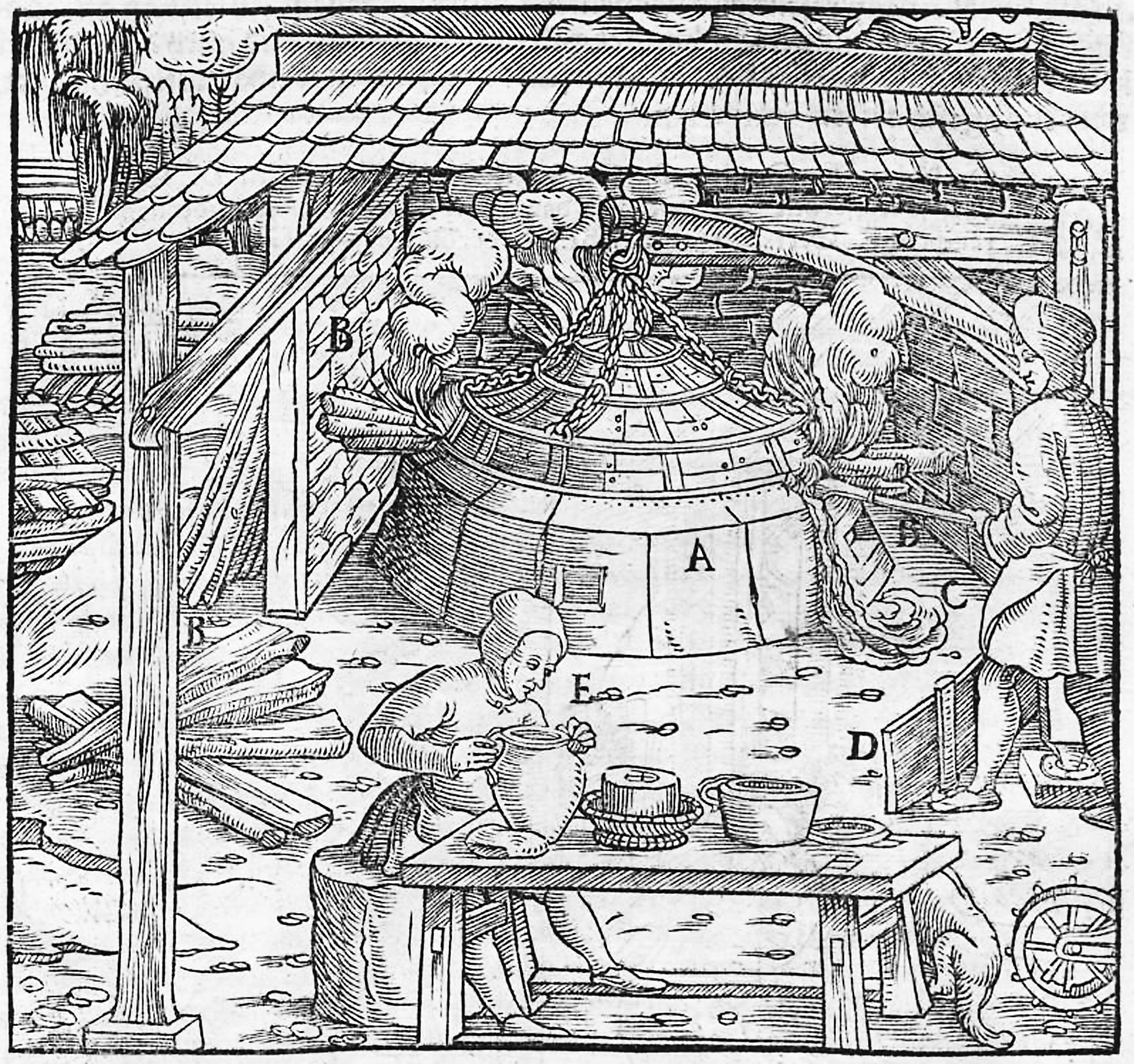 Original image description from the Deutsche Fotothek Bergwerk & Bergbau & Verhüttung & Hüttenwesen & Metallurgie & Edelmetallscheidung & Treibherd